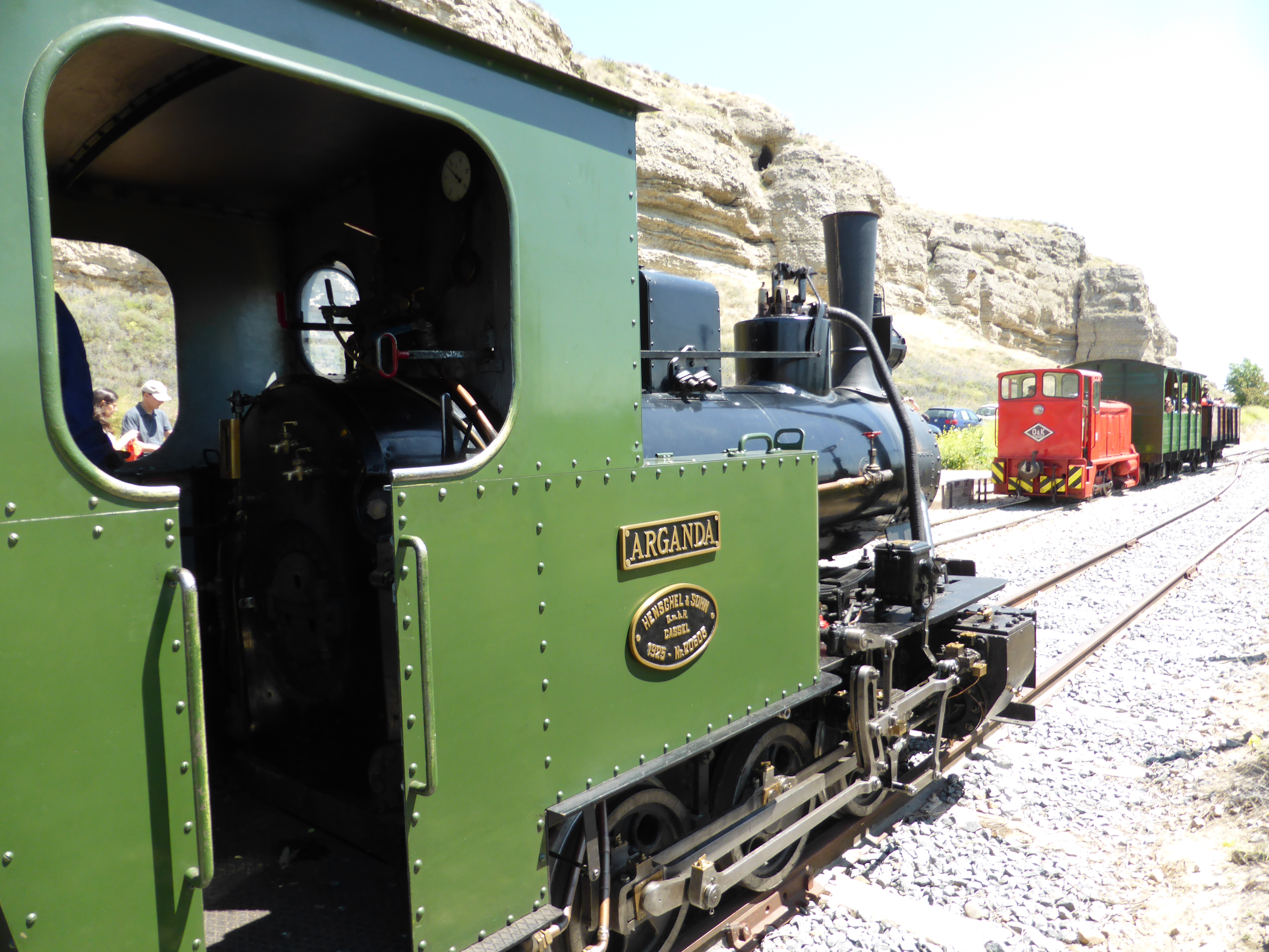 Doble circulación en el Tren de Arganda. Apeadero de la Laguna del Campillo (municipio de Rivas-Vaciamadrid, provincia de Madrid, España). Antiguas vías del Ferrocarril del Tajuña. Locomotora de vapor Henschel "Arganda" (año 1925), y locomotora diésel Orenstein & Koppel (año 1956), de ancho de vía de 1.000 milímetros (1 metro). Temporada de primavera del tren histórico y turístico.